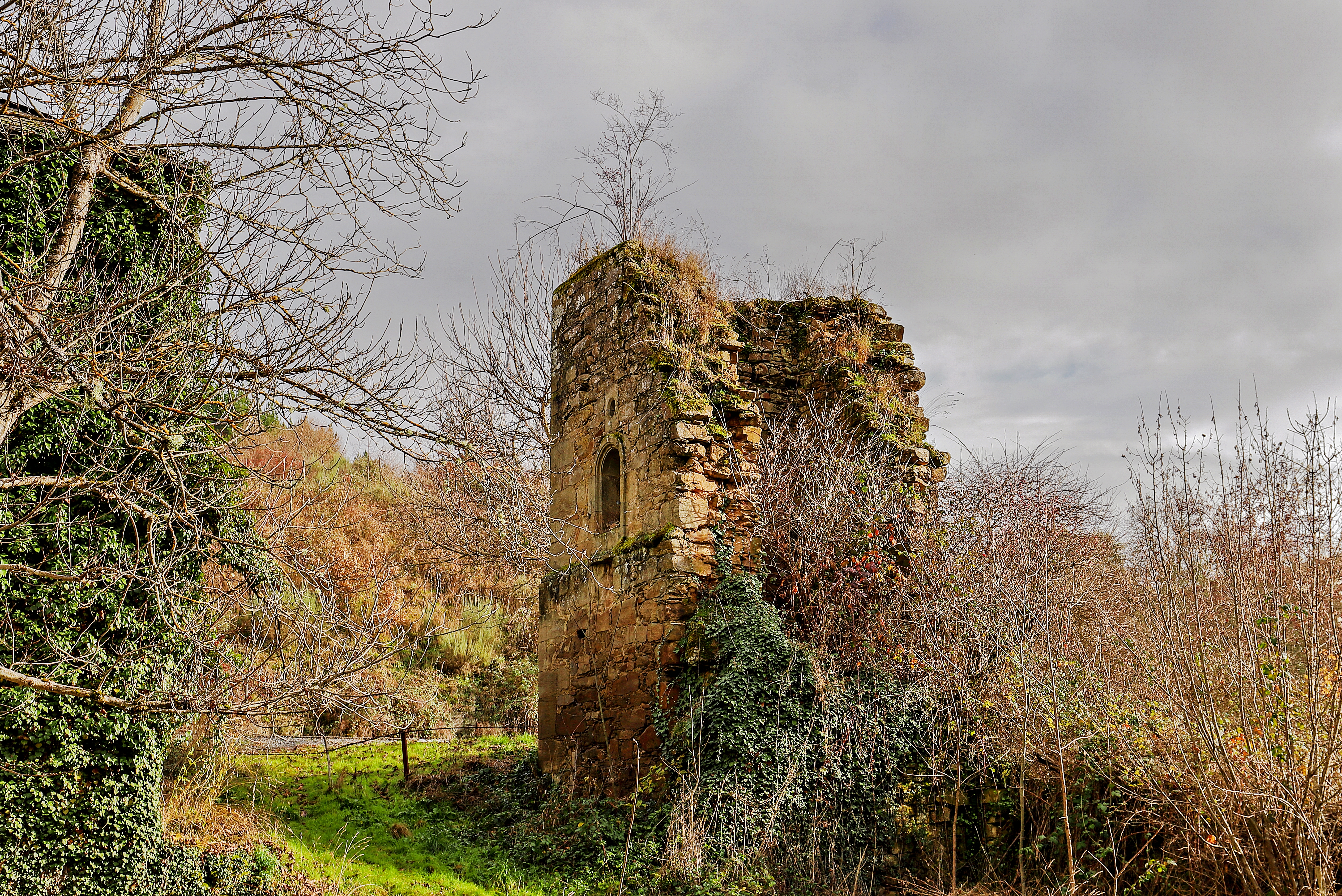 Cerezal de Tremor es un despoblado que pertenece al municipio de Torre del Bierzo, en la comarca de El Bierzo, provincia de León.